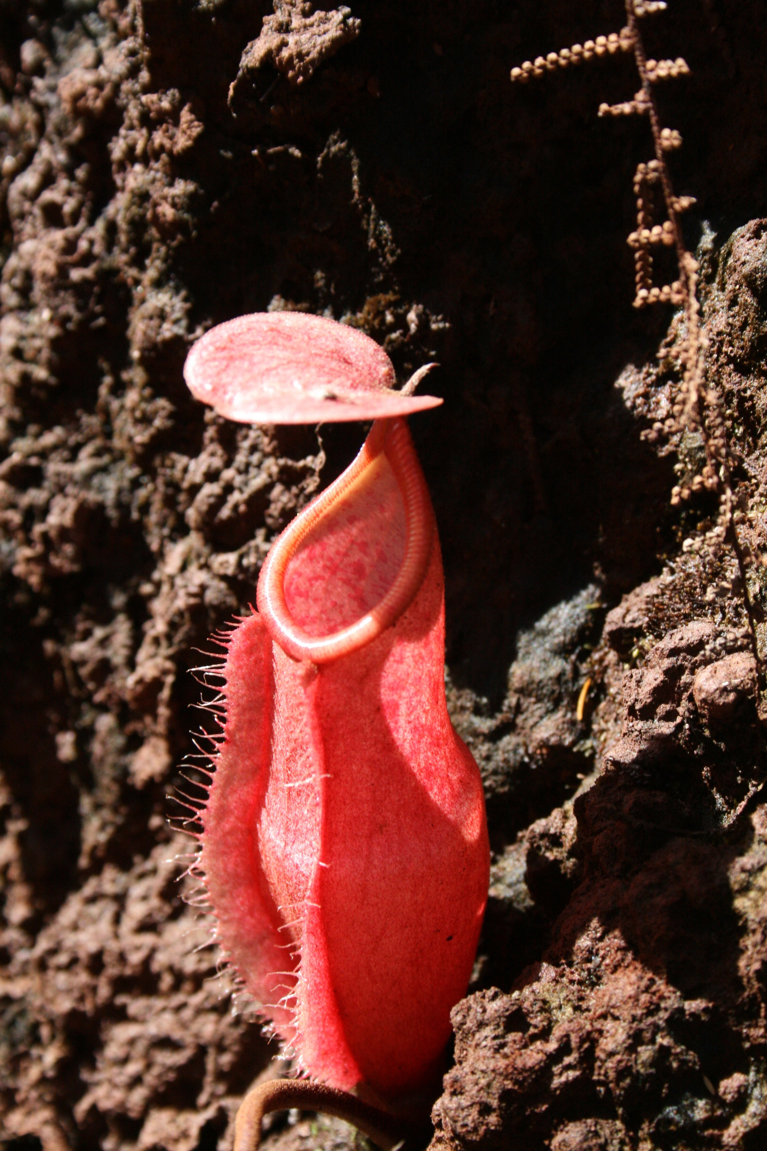 Nepenthes vieillardii lower pitcher. Original description: "Cette plante carnivore de la famile des Nepenthes est très présente le long des chemins de la Rivière Bleu. La fleur n'est pas suspendu contrairement à ce que le pourrait croire."